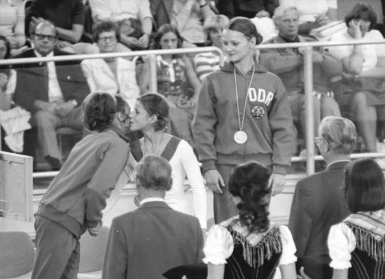 ADN-ZB-Olympiadienst-Kohls-1.9.1972-ma-München: XX. Olympische Sommerspiele. Die Finalwettkämpfe der Frauen im Turnen an den einzelnen Geräten, standen am Abend des 31.8.1972 völlig im Zeichen der großartigen Mädchen aus der UdSSR und der DDR. Die 19jährige Berliner Medizinstudentin Karin Janz (rechts), erkämpfte sich zwei Goldmedaillen. Hier während der Siegerehrung am Stufenbarren, wo sie 19,675 Punkte erreichte. Für Erika Zuchold (links, beide DDR). und Olga Korbut (UdSSR, mitte), die sich nach der Konkurrenz freudig beglückwünschen, gab es mit der gleichen Punktzahl von 19,450 je eine Silbermedaille.